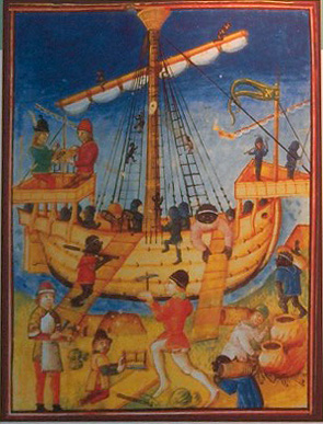 Miniature drawing of a caravel; Museum of the Forte da Ponta da Bandeira; Lagos, Portugal